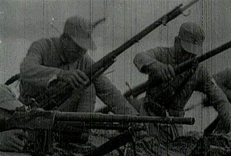 车桥战役历史照片